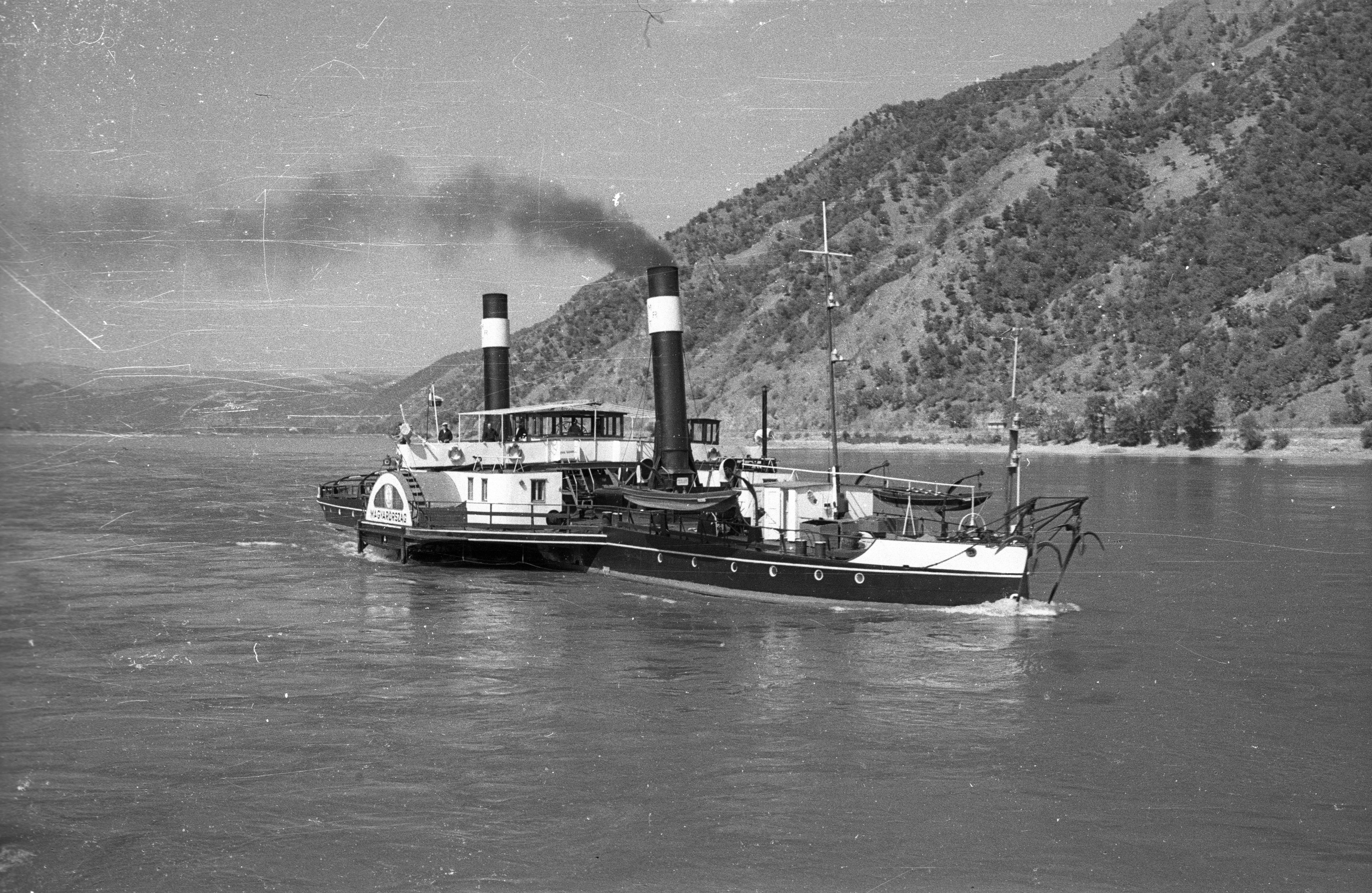 Duna, Vaskapu-szoros, a MAGYARORSZÁG/1921 típusú oldalkerekes vontató gőzhajó